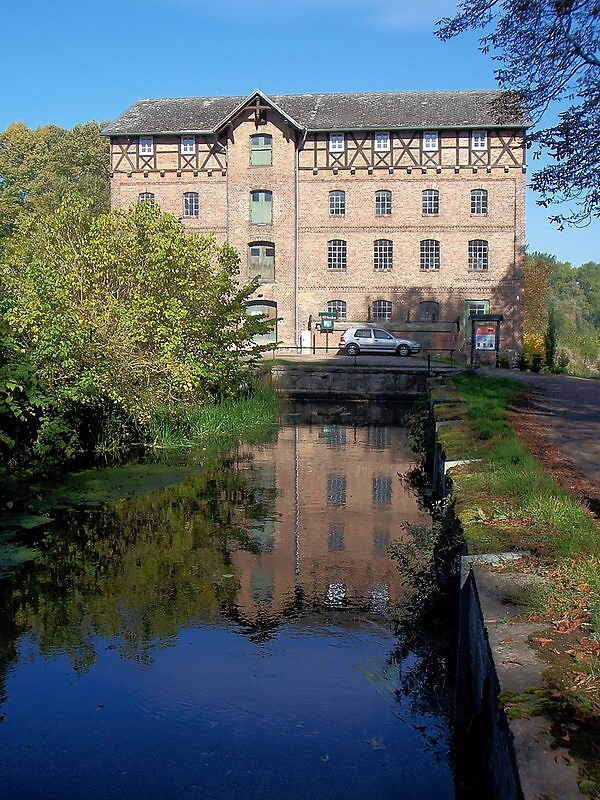 Die Gielower Mühle am Peenekanal, wird bei Fritz Reuter in seinem Roman "Ut de Franzosentied" erwähnt